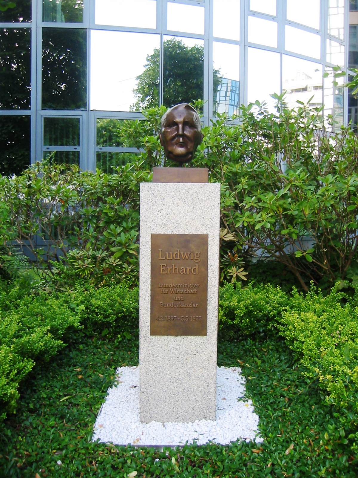 Büste für Ludwig Erhard in der "Straße der Erinnerung", einem öffentlich zugänglichen Denkmal im Spreebogen im Berliner Ortsteil Moabit. Mit den Skulpturen ehrt die Ernst Freiberger-Stiftung Persönlichkeiten, die vorrangig in der ersten Hälfte des 20. Jahrhunderts "außergewöhnliches geleistet und in schwierigsten Zeiten vorbildliche Haltung bewiesen haben“.